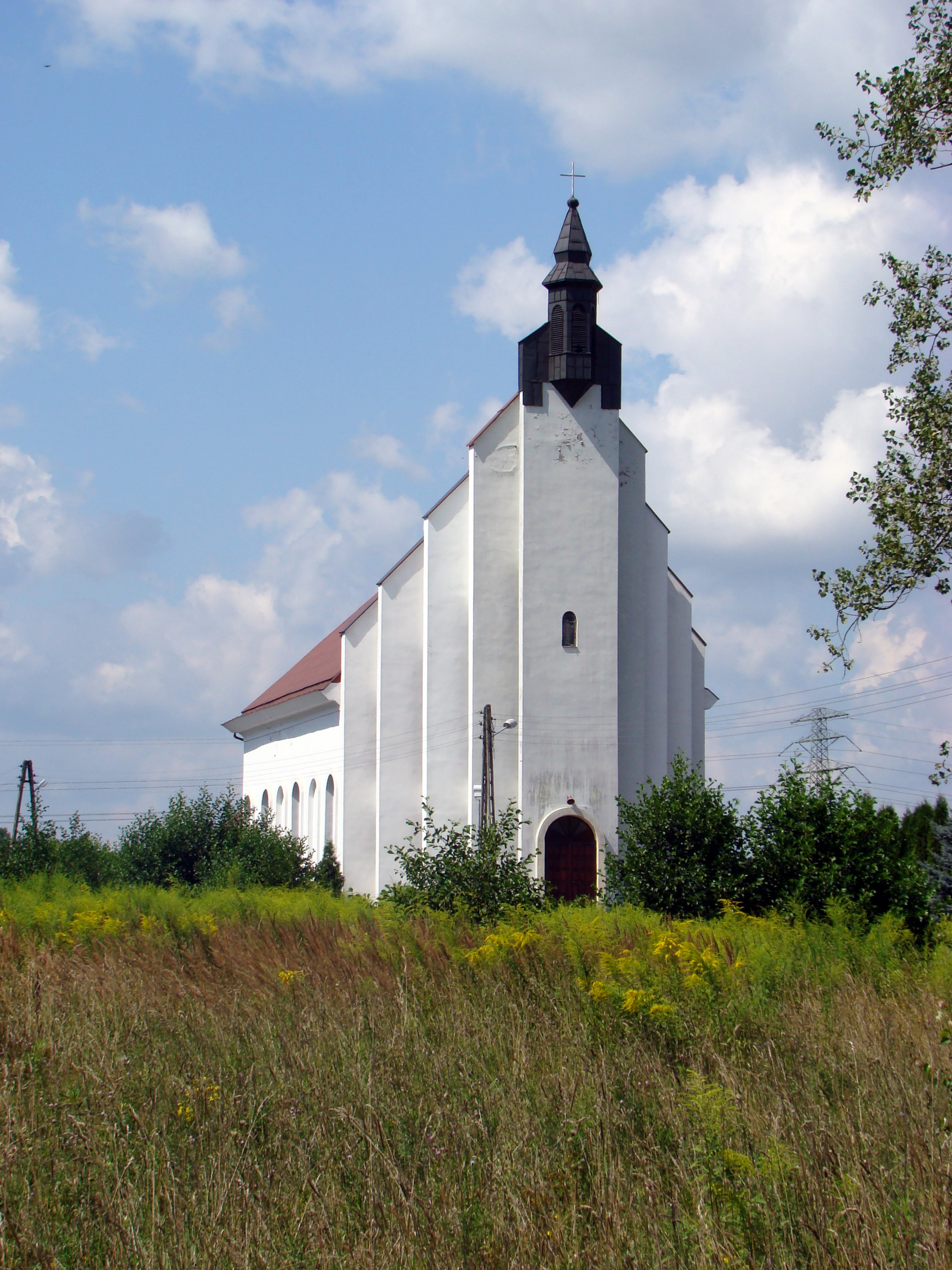 Kościół bł. Karoliny Kózkówny w Wanatach wybudowany w latach 1990-2000.